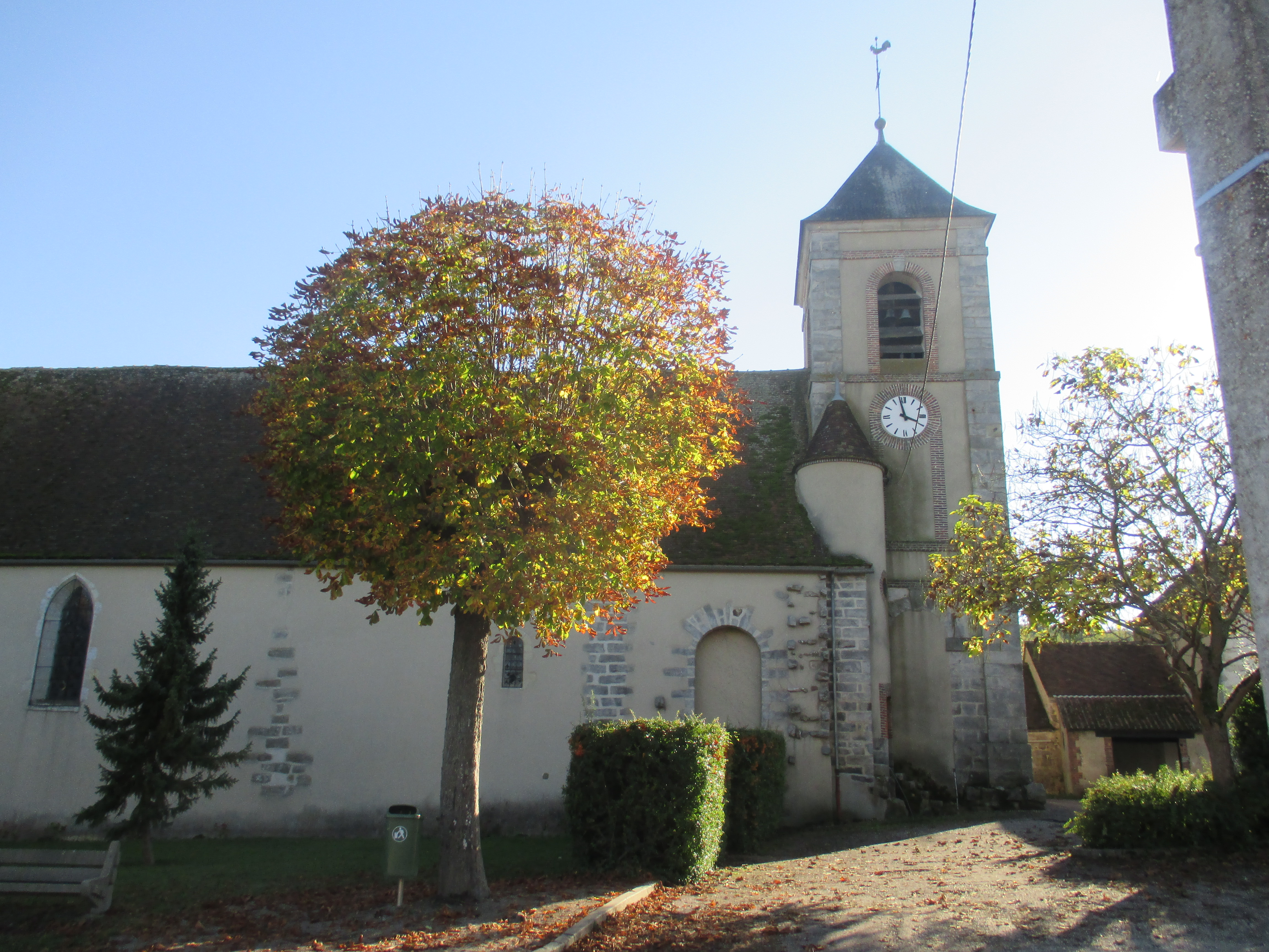 Église Saint-Germain de Marsangy (Yonne, archidiocèse de Sens-Auxerre).